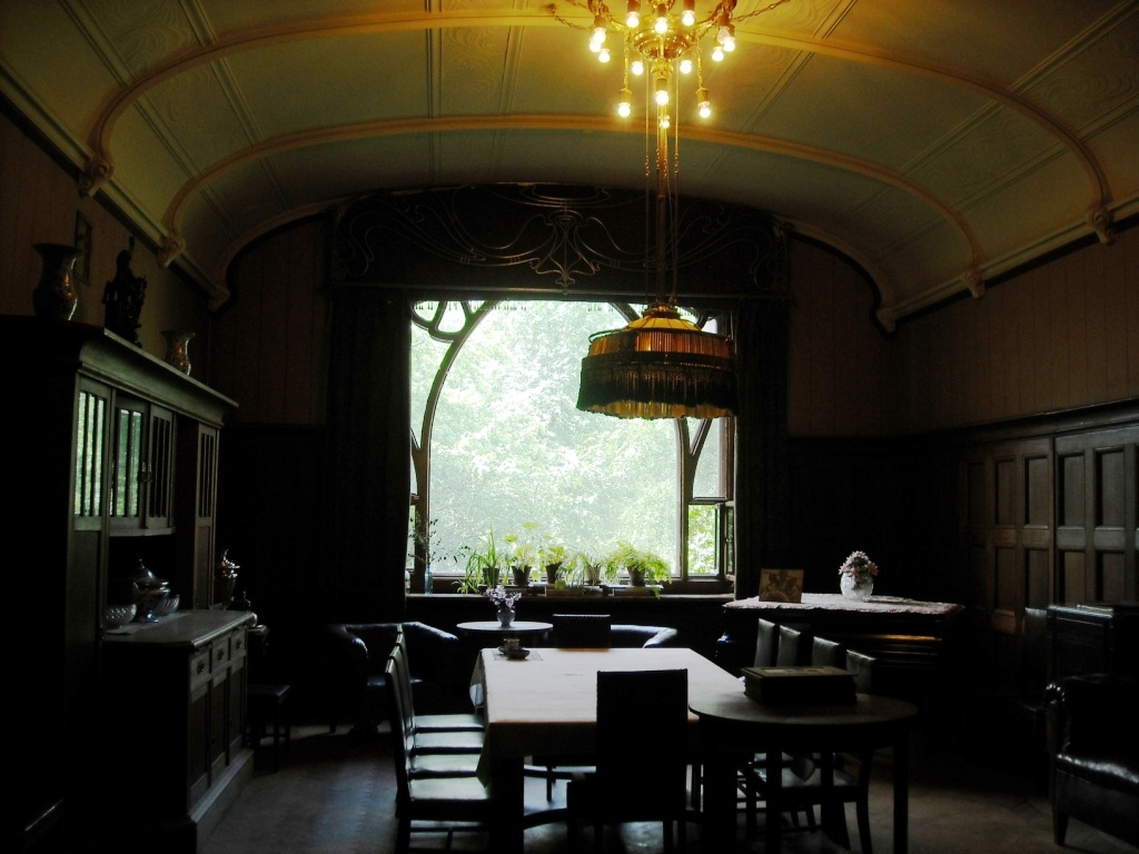 Malaya Nikitiskaya to Церковь Вознесения Господня в Сторожах, у Никитских ворот («Большое Вознесение»)